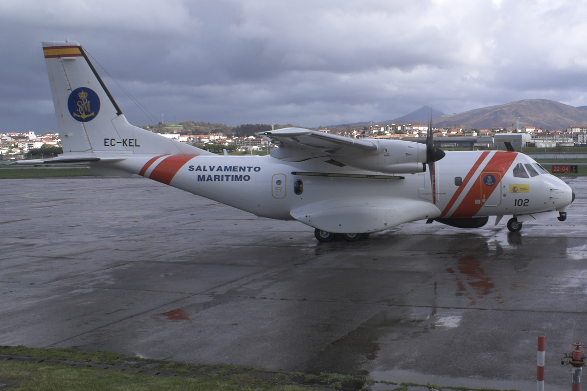 Salvamento Maritimo CASA CN-235-300 EC-KE San Sebastian (EAS/LESO)